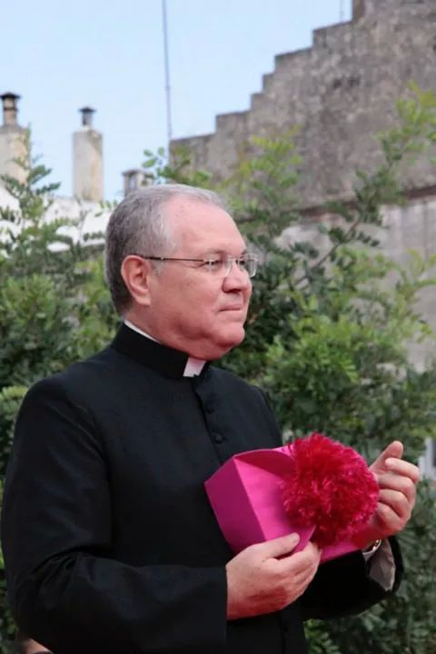 Vescovo